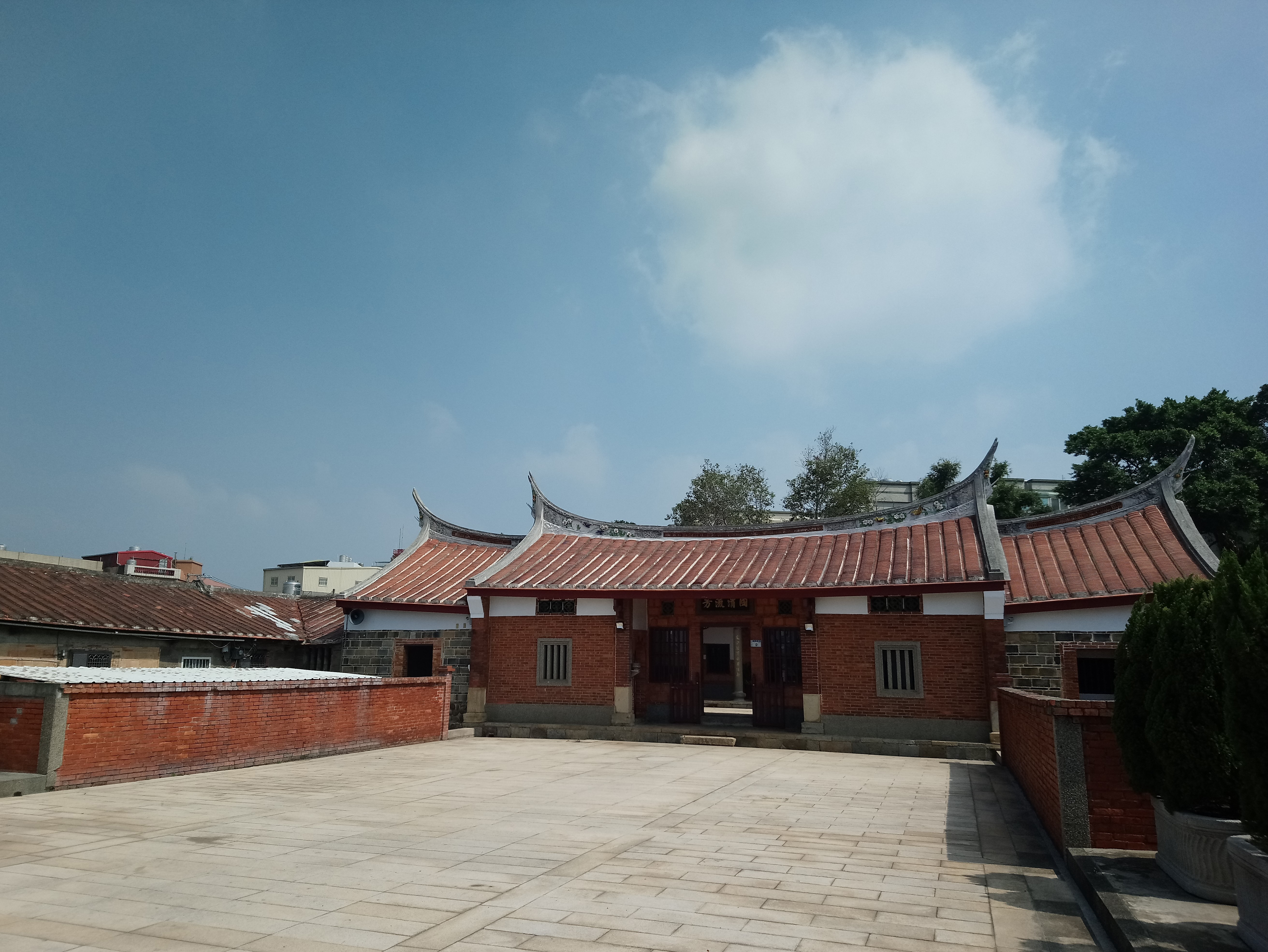 新屋范姜祖堂近景,桃園市新屋區新屋次分區新生里